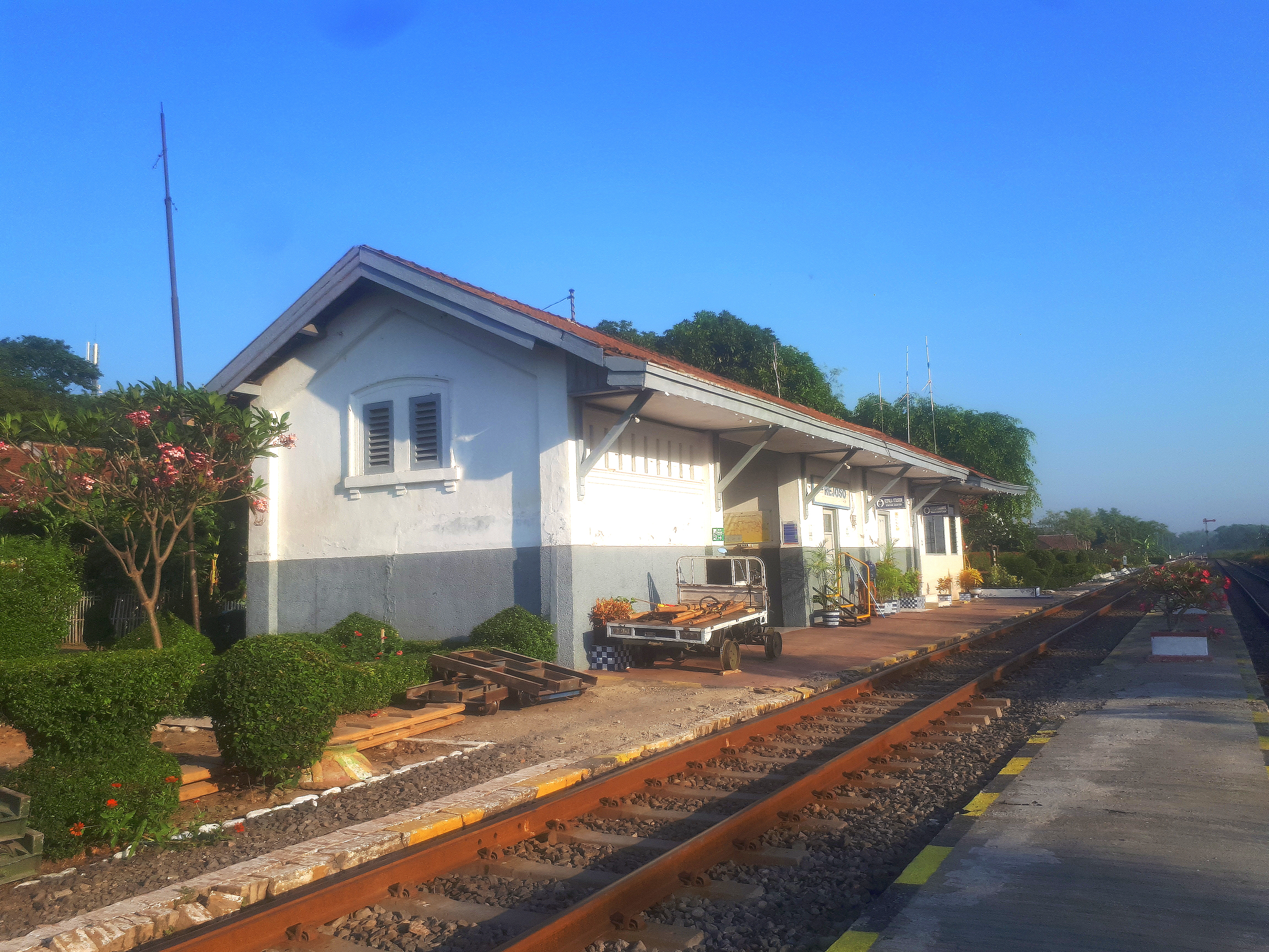 Bangunan Stasiun Rejoso, 2020